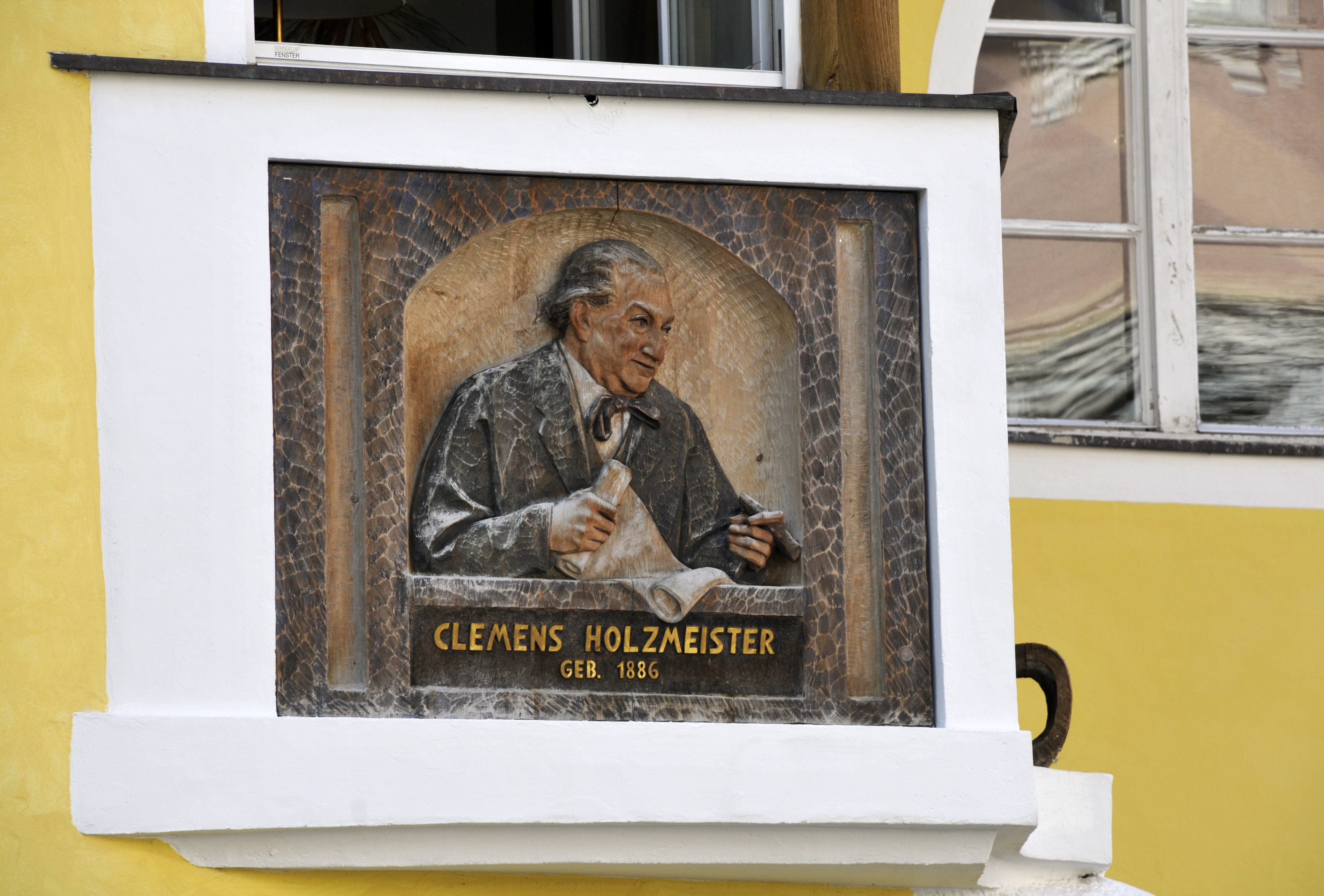 Austrian architect Clemens Holzmeister, relief by Hermann Josef Runggaldier on the Hotel Adler in St. Ulrich in Gröden - Ortisei Val Gardena.